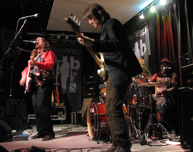 Sky High in Hallsberg, Sweden